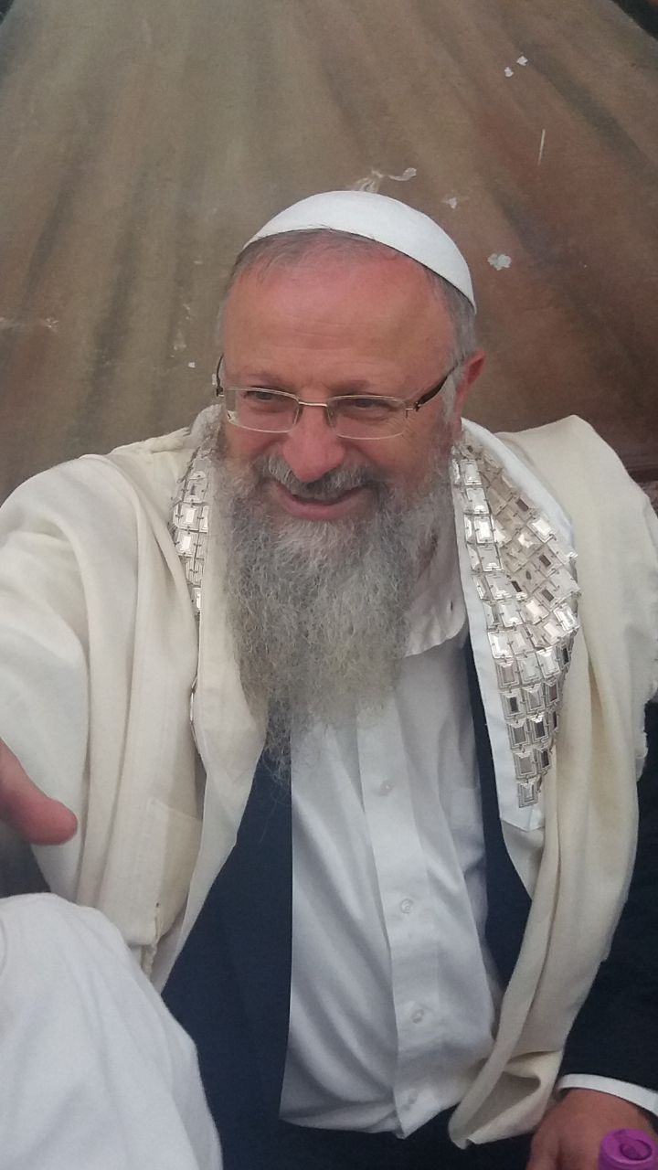 הרב שמואל אליהו בפסח תשע"ו בביתץ הכנסת אבוהב בצפת